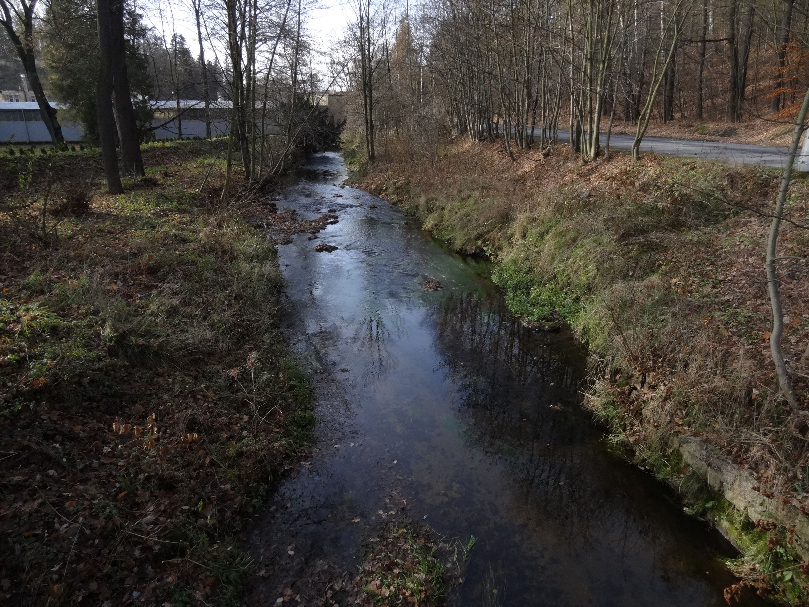 Stráž nad Nisou - Černá Nisa u mostu poblíž autobusové zastávky Kateřinská, u vjezdu do továrního areálu v ul. Kateřinská 1